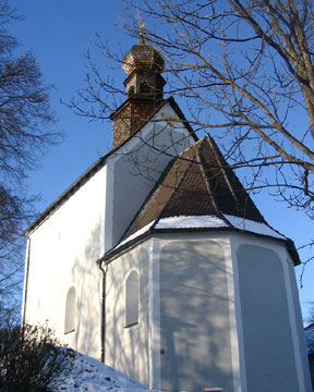 Jhdt., profanes Obergeschoß